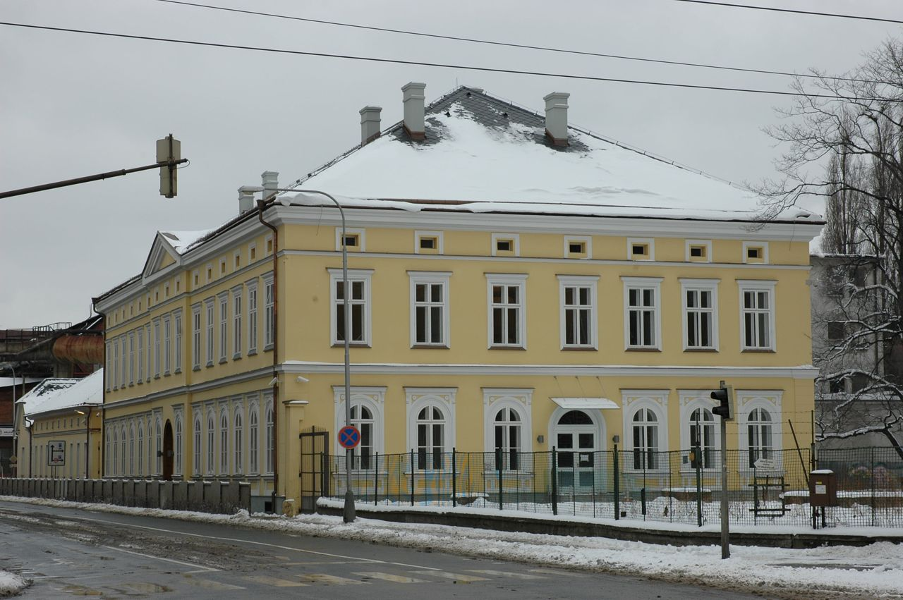 Rothschildův empírový zámek, Výstavní ulice, Ostrava-Vítkovice